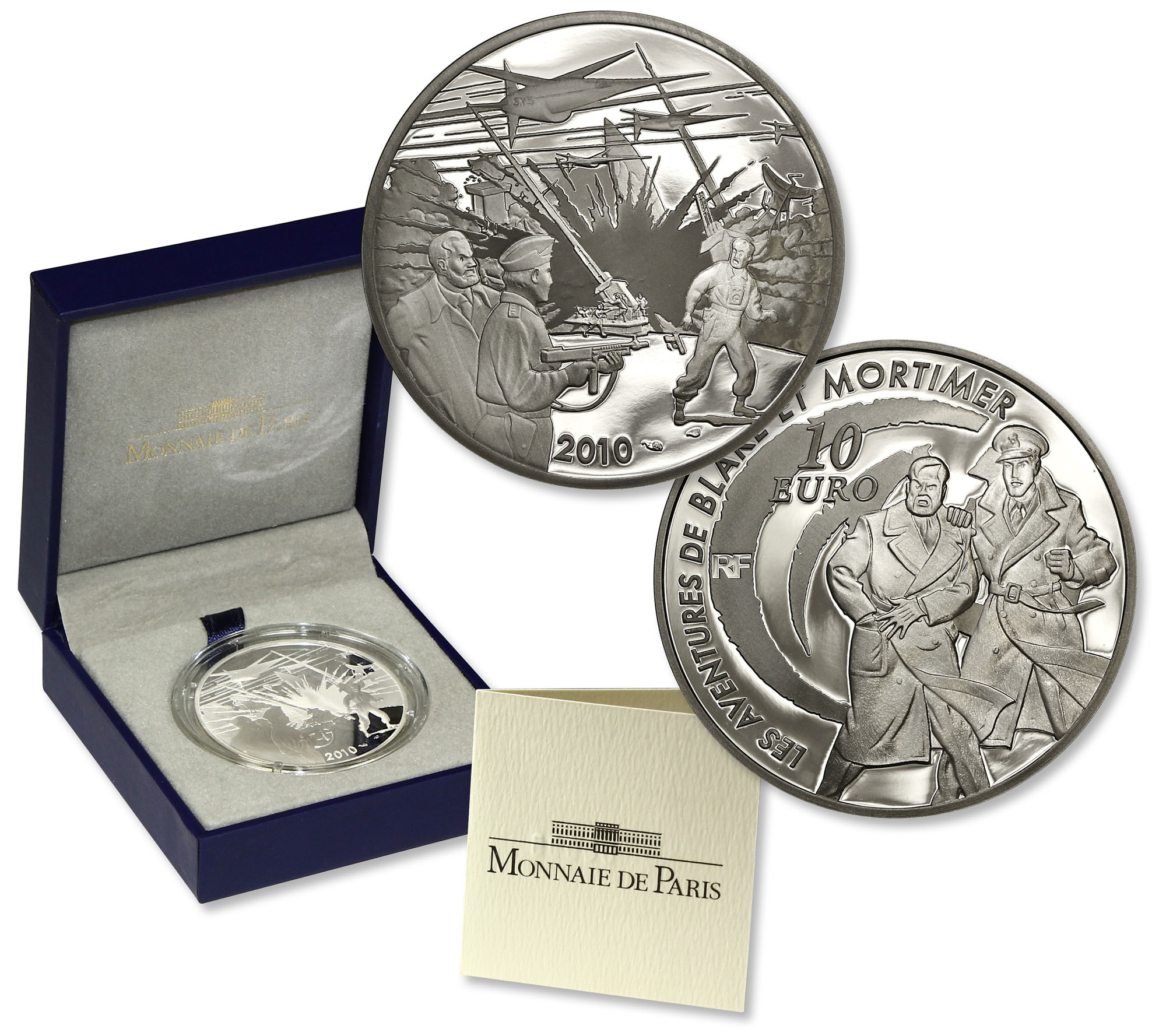 Nom de l'atelier : Pessac Quantité frappée : 10.000 exemplaires Métal : argent Titre en millième : 900‰ Diamètre : 37mm Axe des coins : 12h. Poids : 22,2g. Description avers : Représentation d’une scène tirée de l’album “Secret de l'Espadon” - Blake et Mortimer arrêtant le Colonel Olrik sur fond d’attaque d’avions Espadons. Description revers : Blake et Mortimer en pied dans leur pose caractéristique - en arrière-plan M symbole de la série dans lequel RF est inséré et sur lequel vient s'inscrire la valeur faciale - à gauche “LES AVENTURES DE BLAKE ET MORTIMER” .